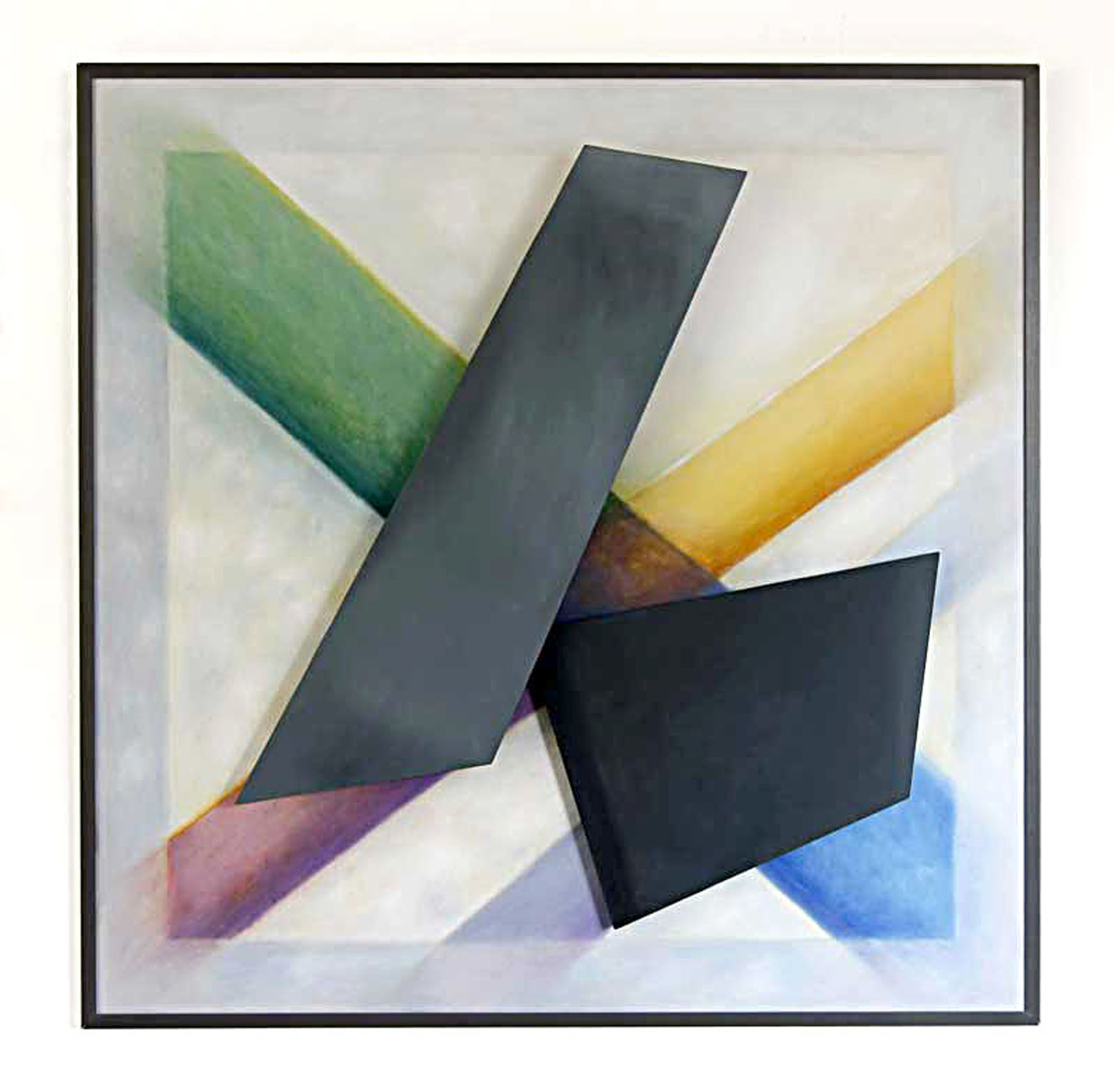 1=Jox Reuss, "Der Ritter von der heiteren Gestalt", 1992, 130x130 Öl auf Holz mit drehbaren, veränderlichen Elementen